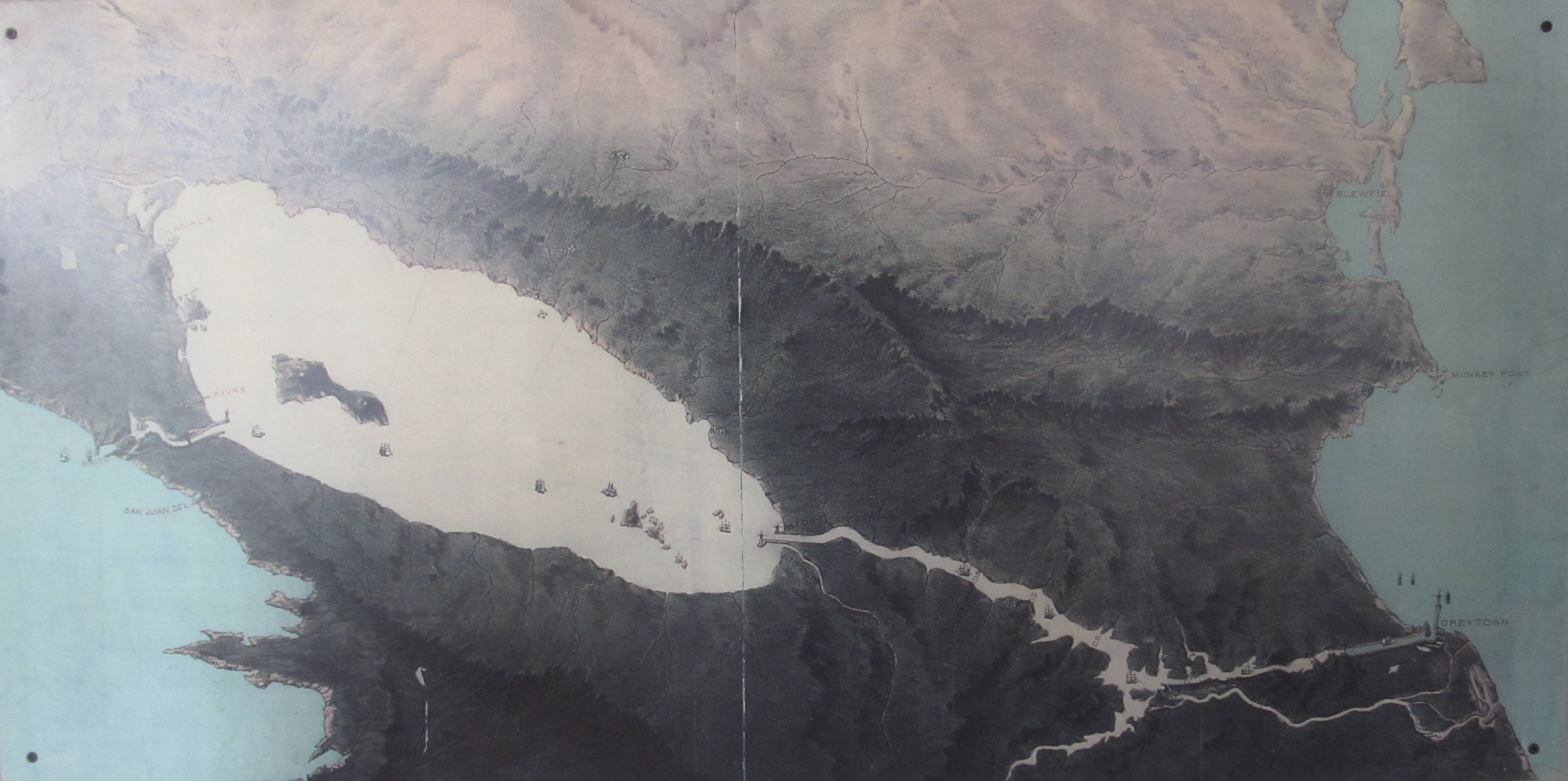 Ältere Darstellung des Nicaraguasees und des geplanten Nicaraguakanals.